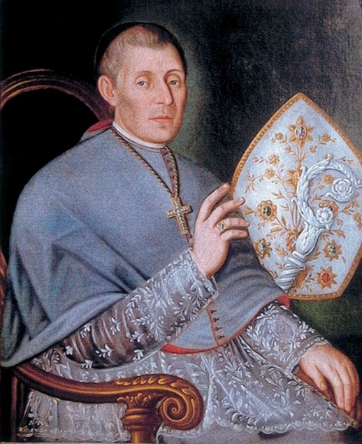 Il ritratto del primo vescovo della Diocesi di Caltanissetta, eseguito nel XIX secolo dal pittore sancataldese Carmelo Giunta